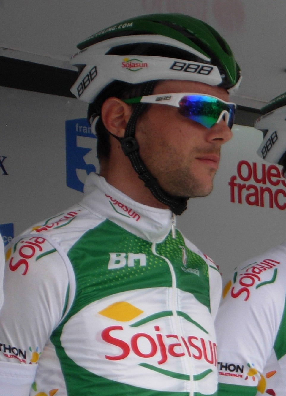 Tour de Bretagne 2013 - Présentation des équipes au départ de la deuxième étape à Ploemel - Équipe Sojasun Depicted person: Paul Poux